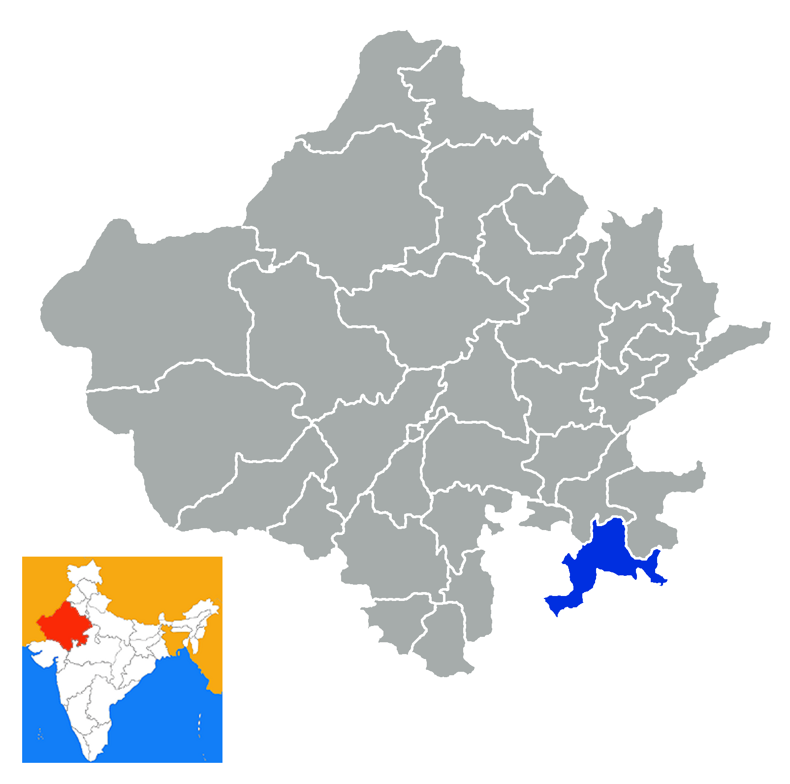 Diastrito de Jhalawar Rajastán India